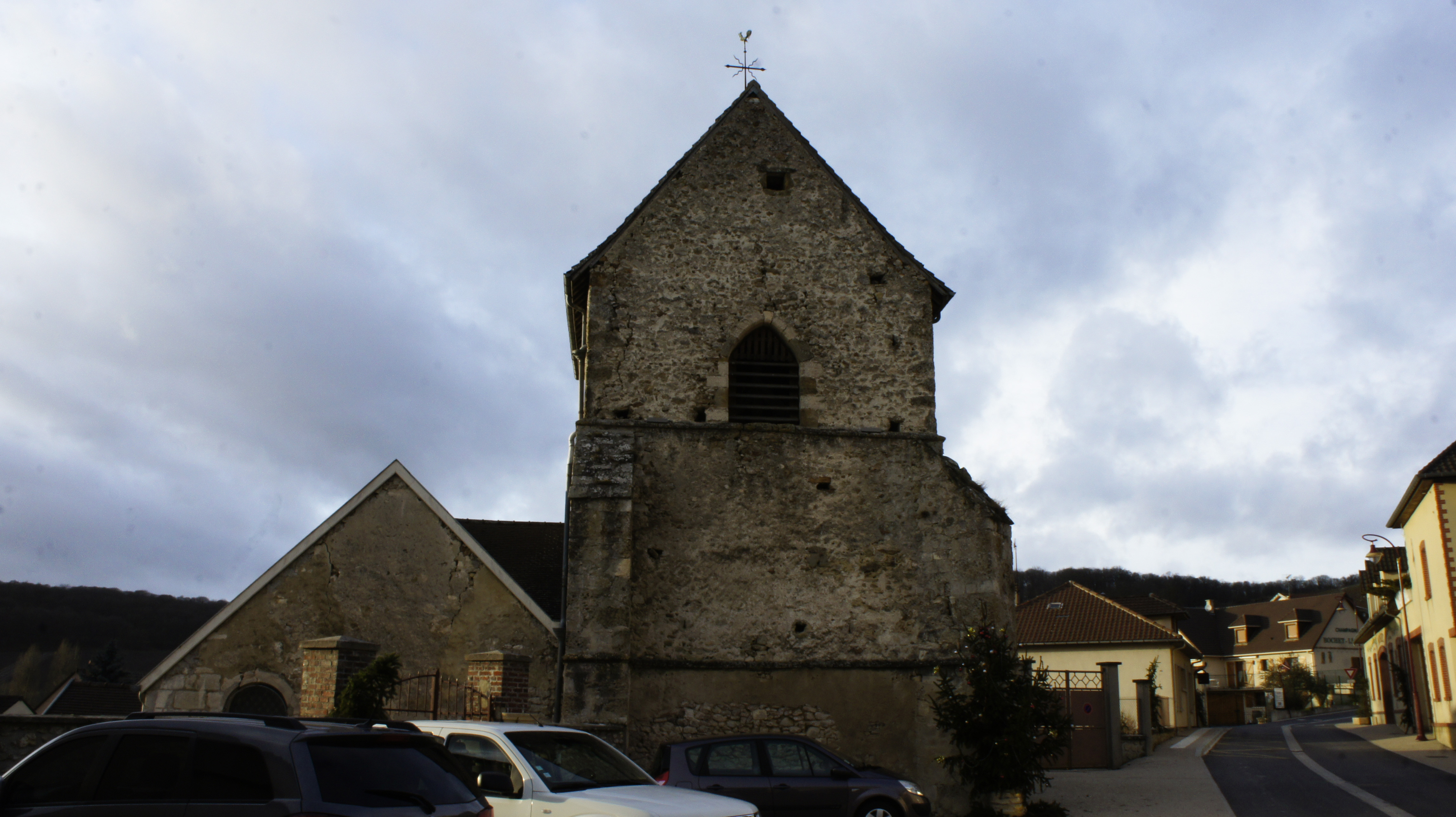 Église_de Cormoyeux .